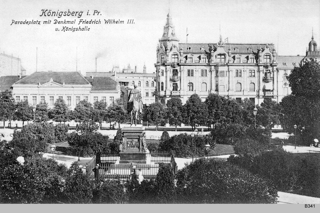 Königsberg